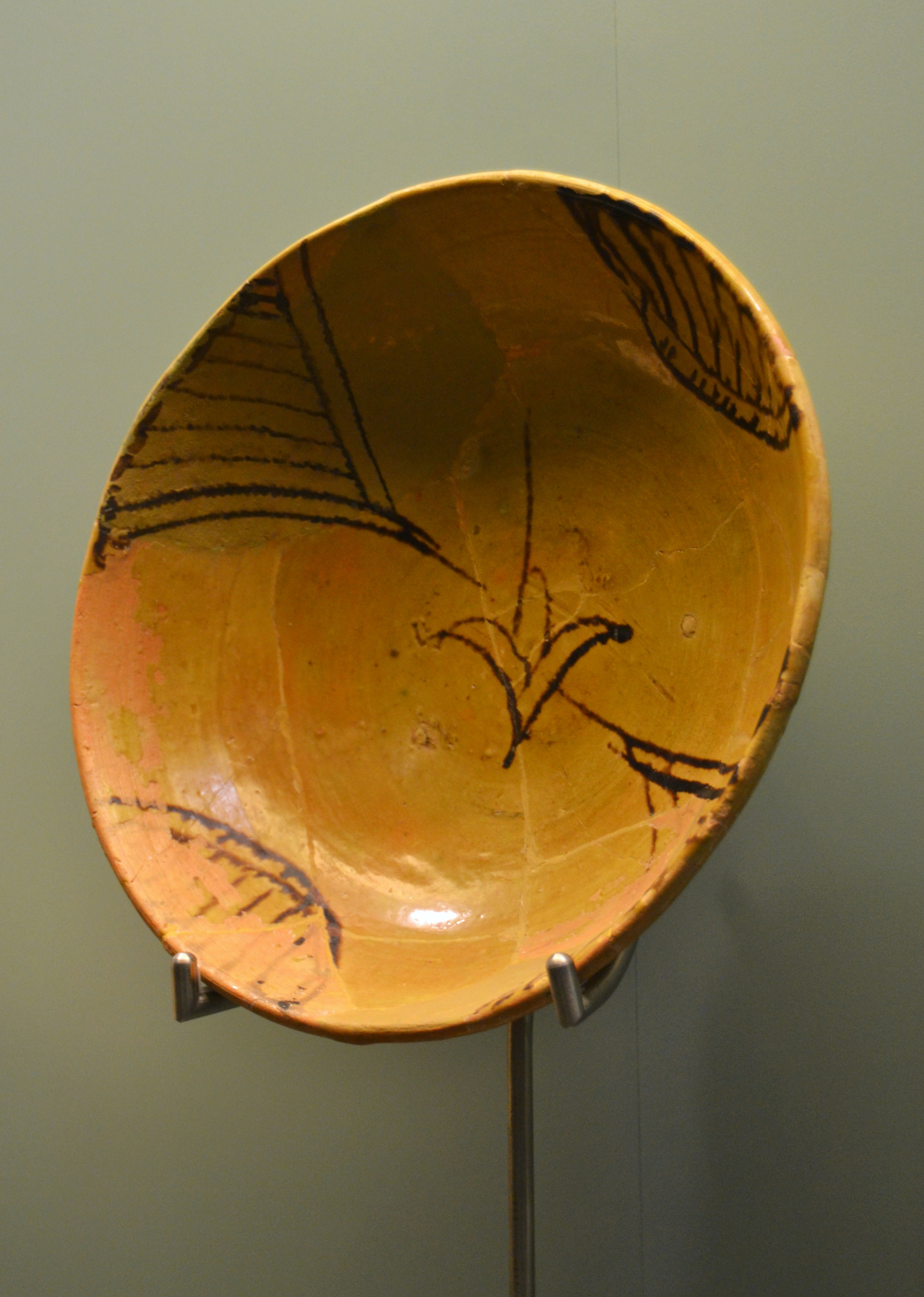 Safa, segle XI, dipòsit de l'ajuntament de Benetússer, museu Nacional de Ceràmica de València.